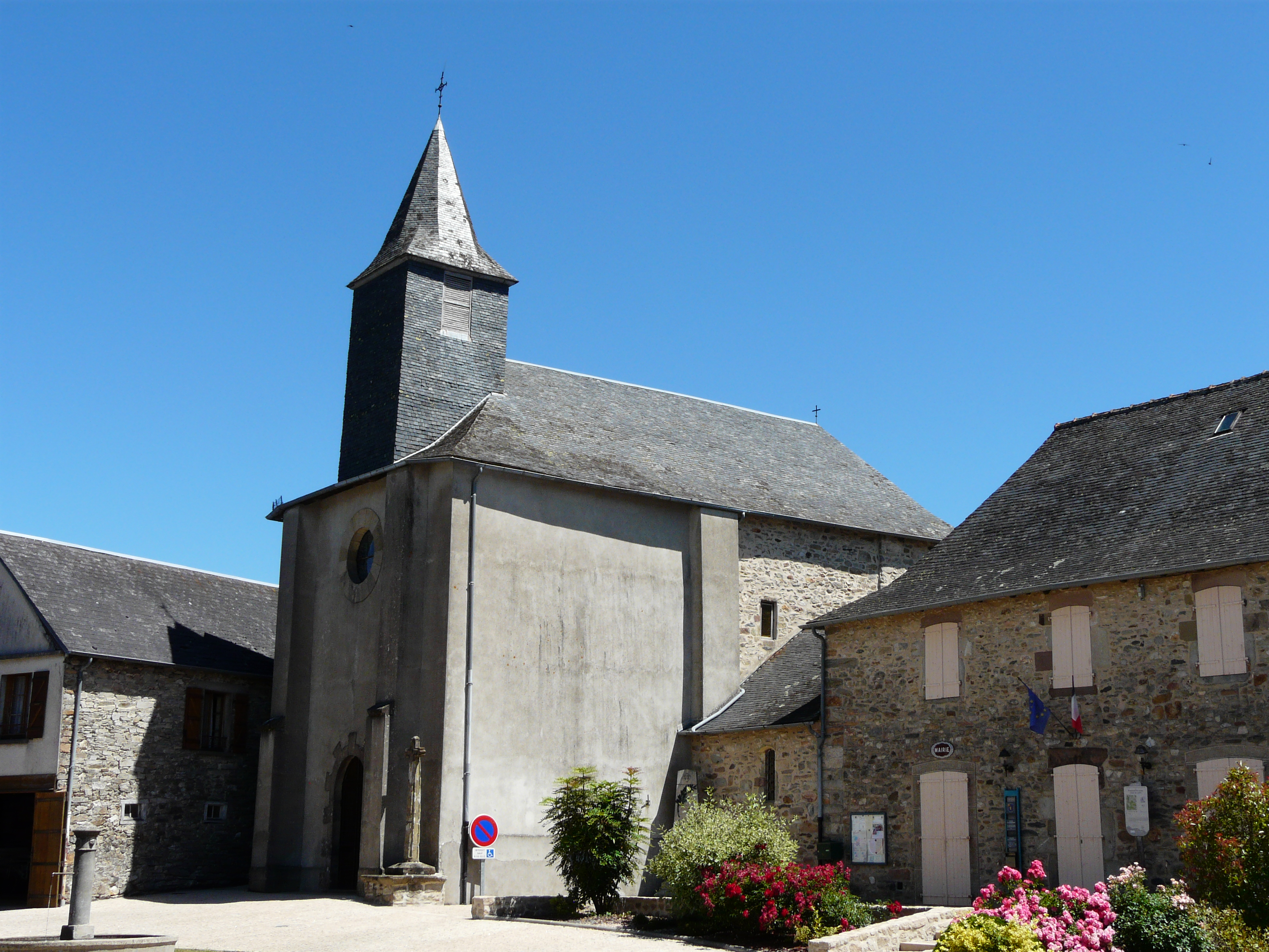 L'église dans le bourg, Le Chastang, Corrèze, France.